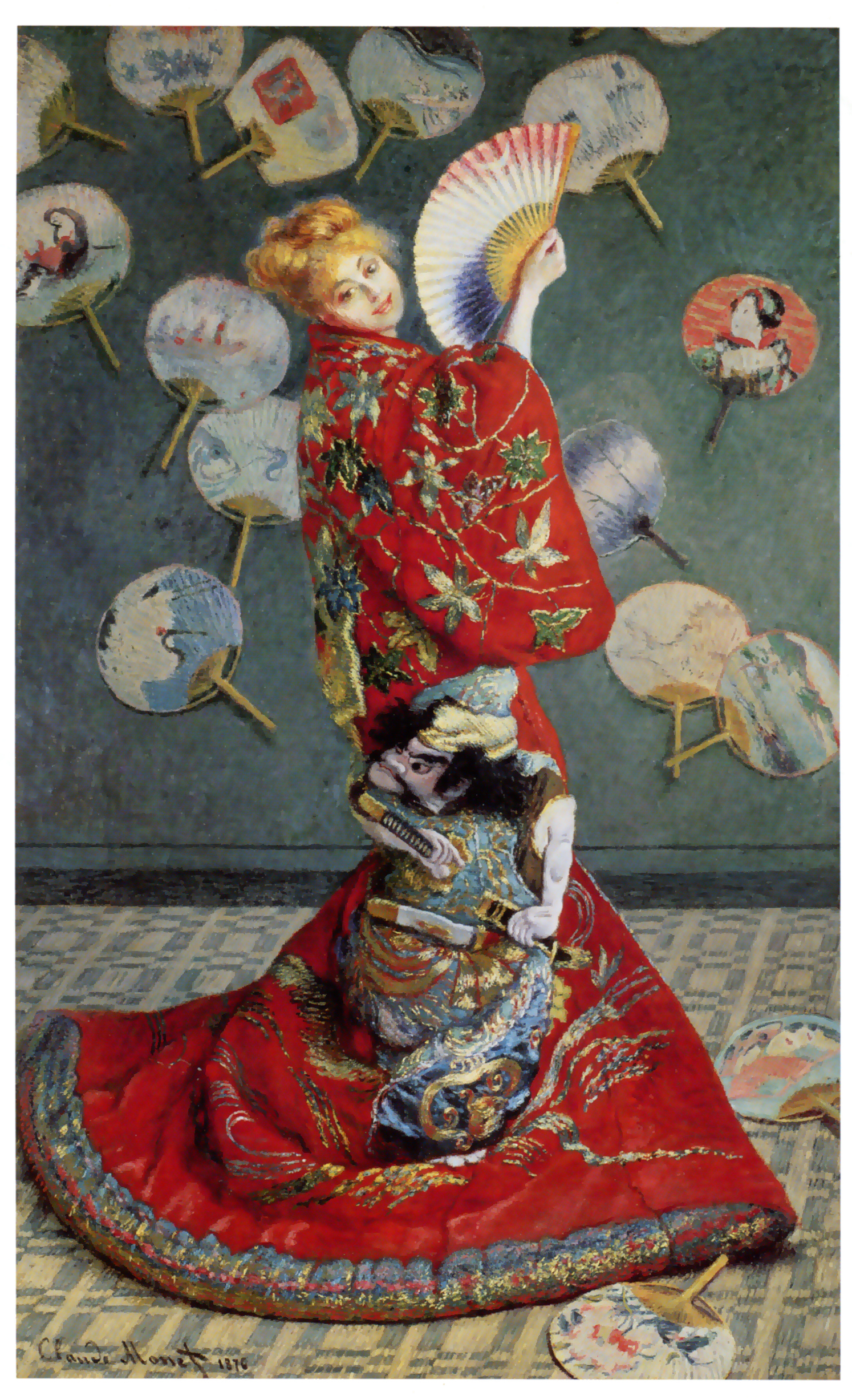 La Japonaise. (Camille im japanischen Kostuem)